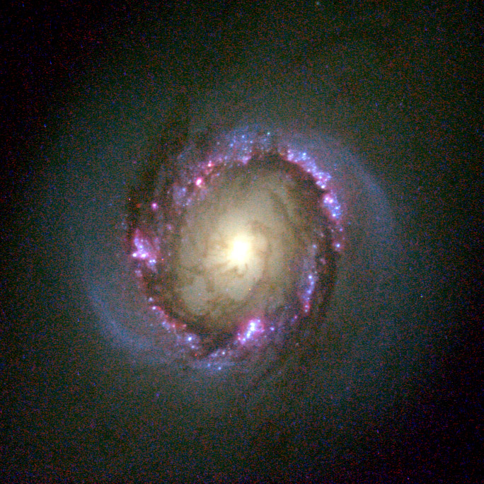 NGC 4314